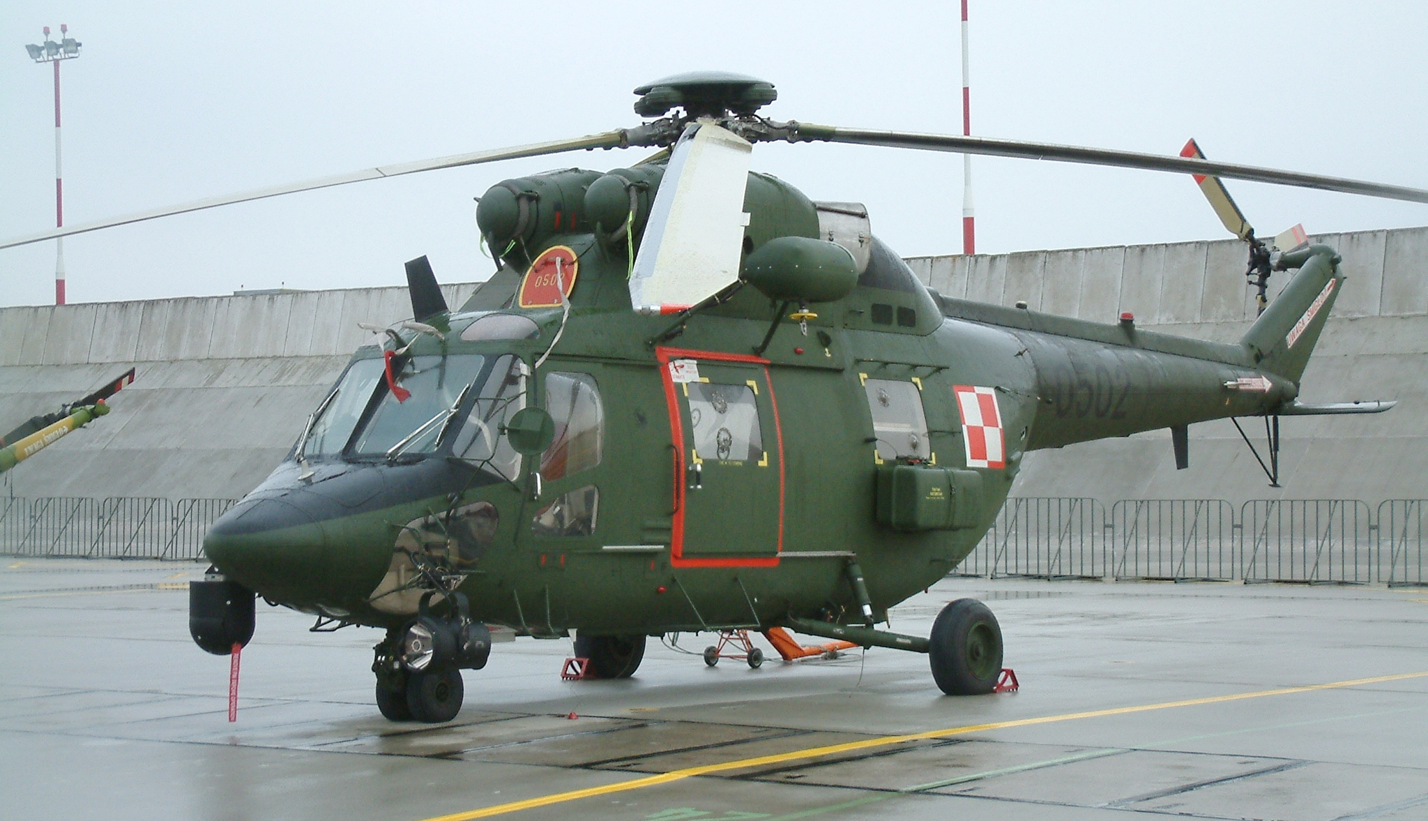 PZL W-3RL Sokół #0502 of Polish Air Forces, 31st. Air Base Poznań-Krzesiny